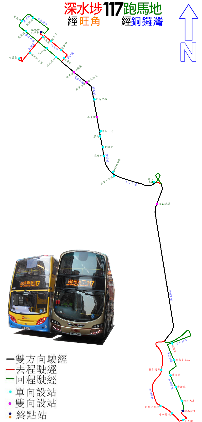 中文（香港）: 過海隧巴117線的走線圖